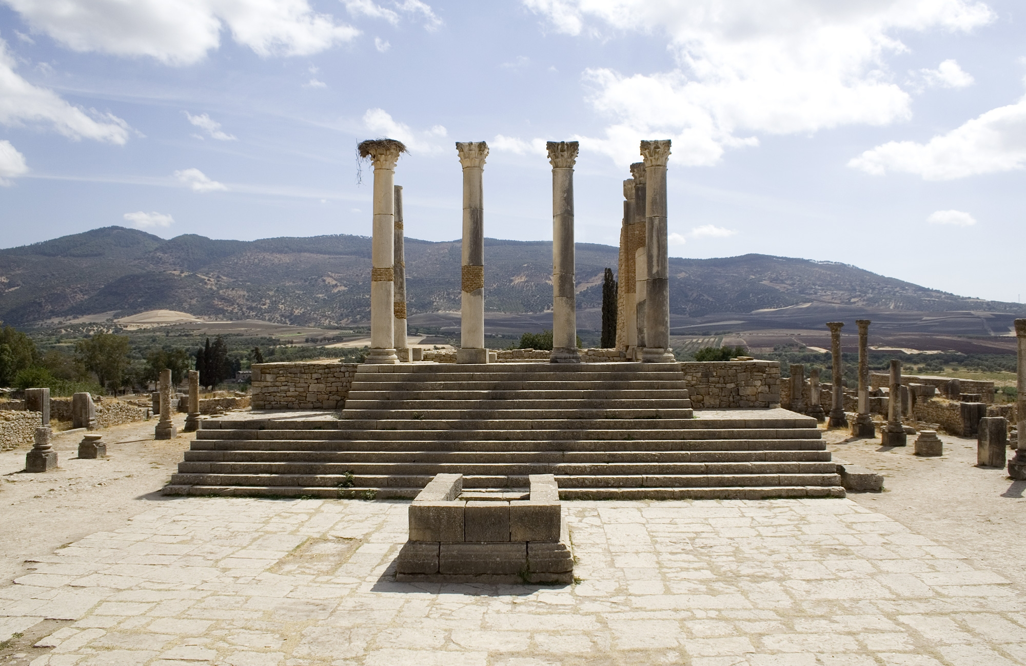 Capitoline Temple, Volubilis